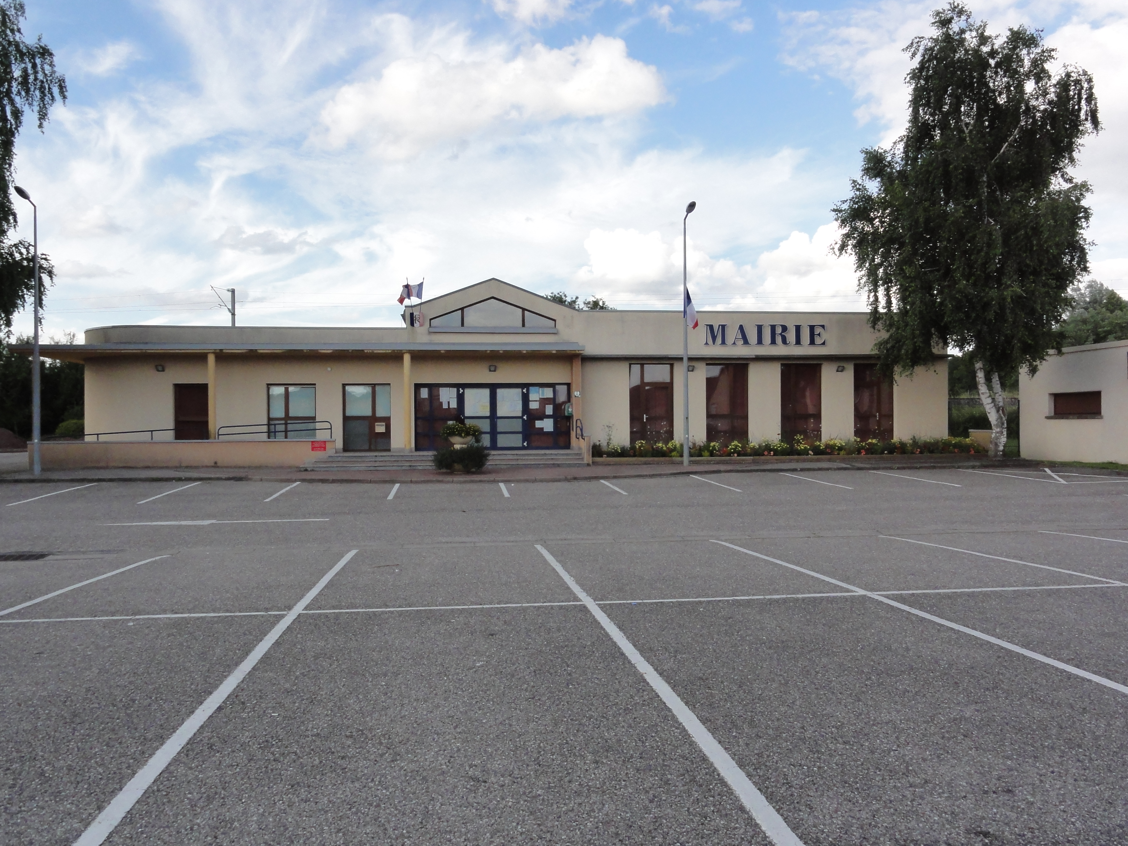 Moncel-lès-Lunéville (M-et-M) mairie